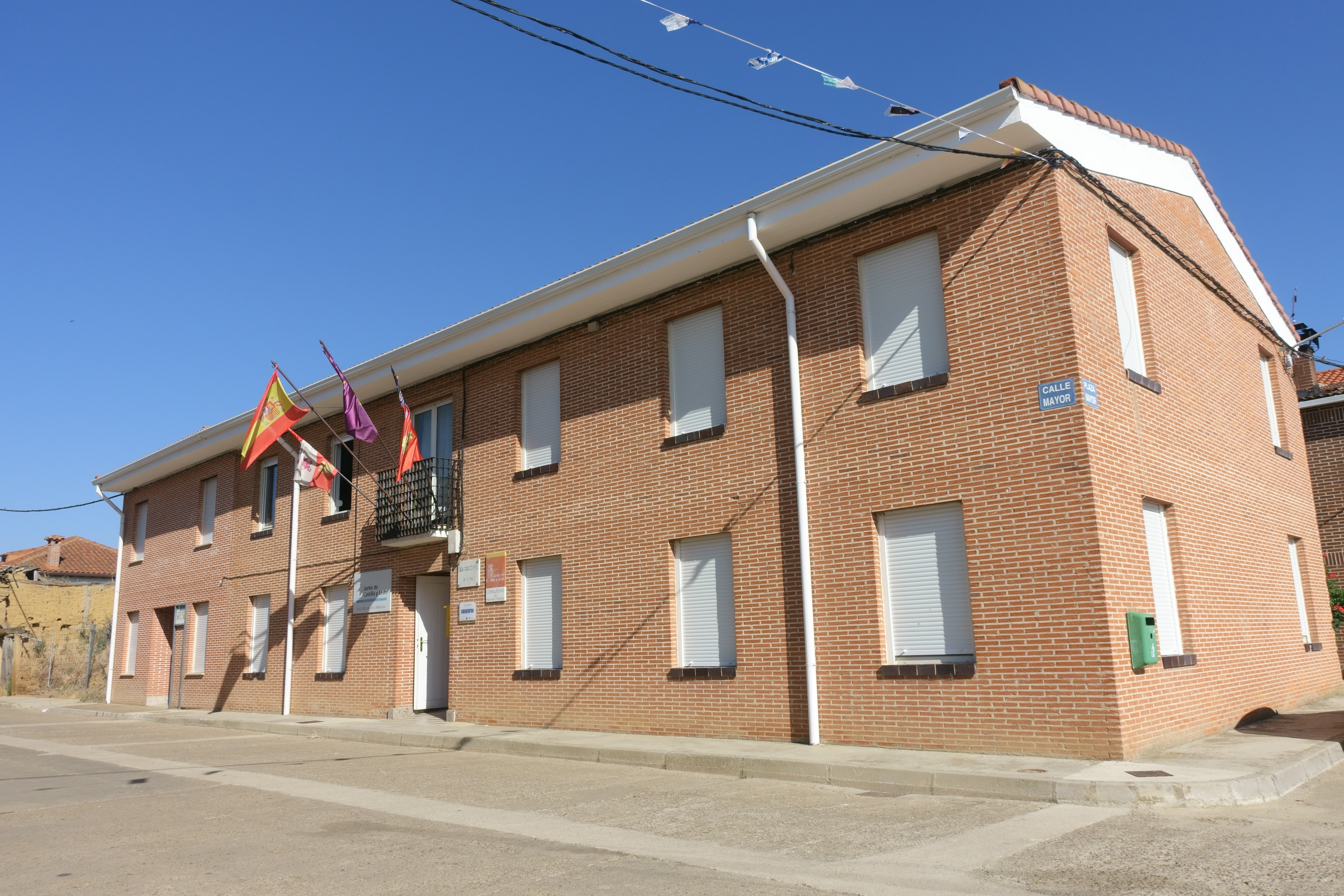 Casa consistorial de Villamoronta (Palencia, España).